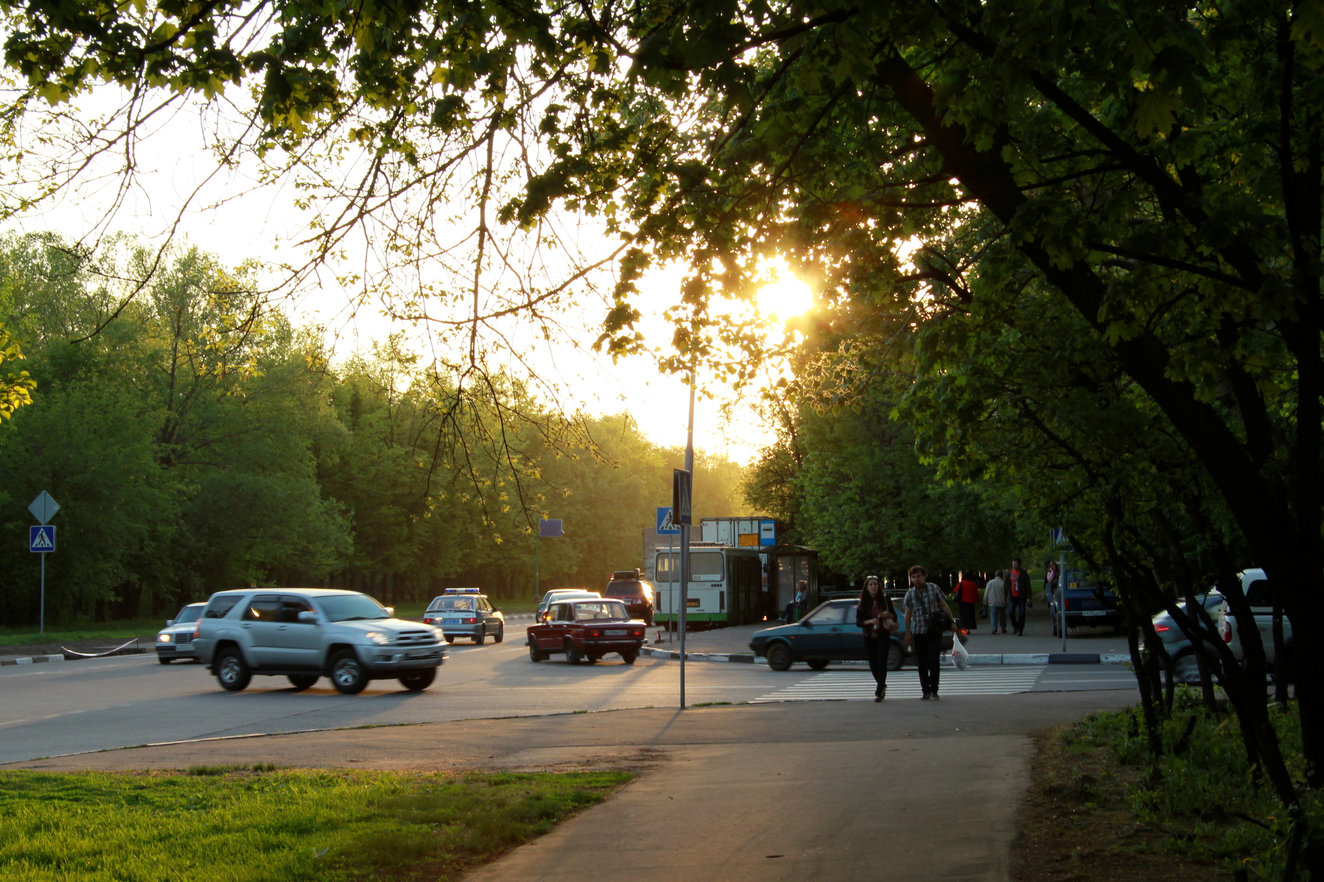 Krasniy Kazanec street (Улица Красный Казанец)